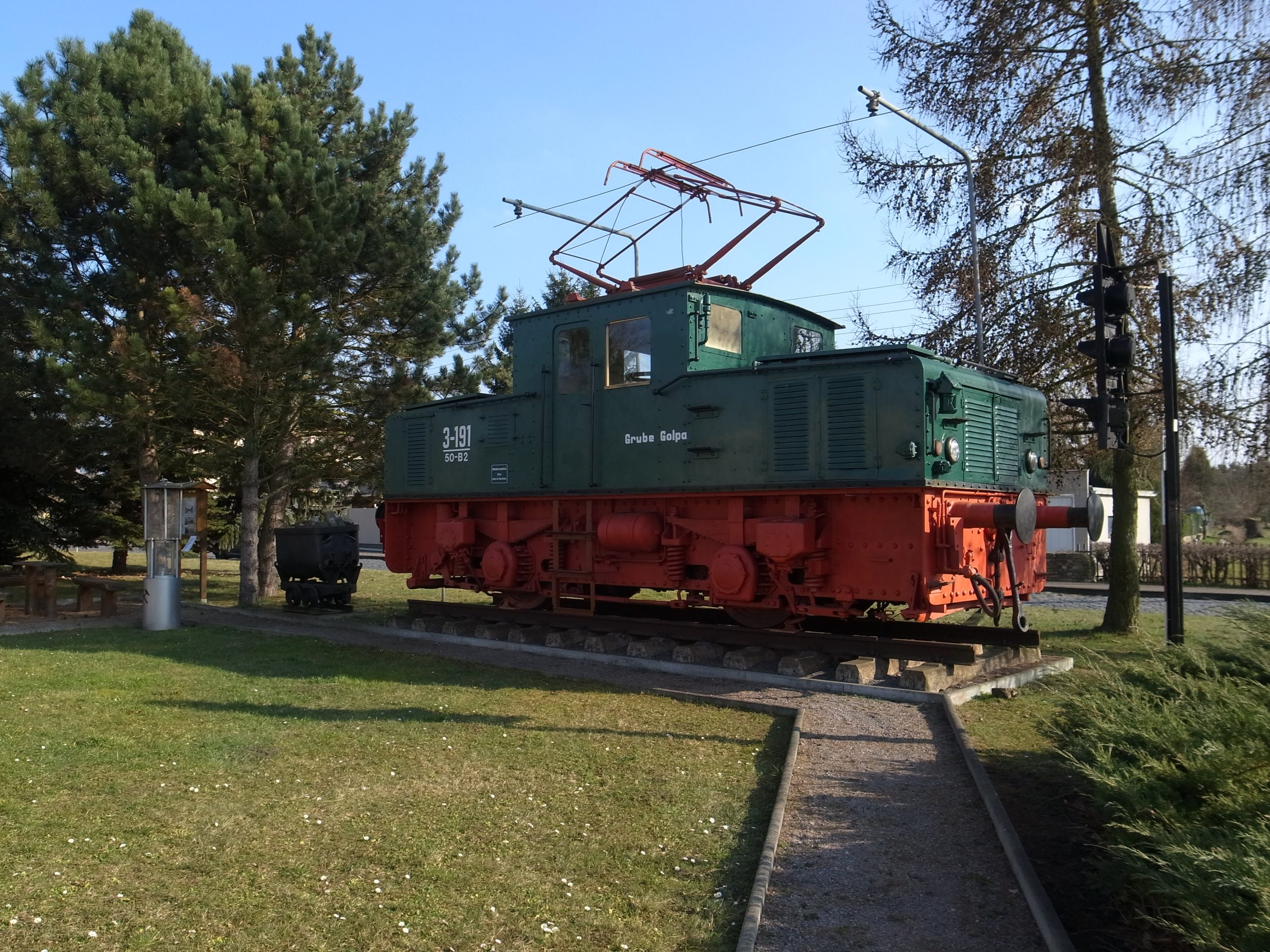 Möhlau, Rastplatz mit E-Lok und Grubenhund. Information von der Schautafel an der Lok: Die aufgestellte E-Lokomotove (SSW) wurde 1940 gebaut in den Siemens-Schuckert-Werken Nürnberg. Gewicht: 50 Tonnen. Einsatz als Rangierlok im Bitterfelder Kohlerevier. Der Grubenhund war in der Vorfeldentwässerung Tgb. Muldenstein im Einsatz